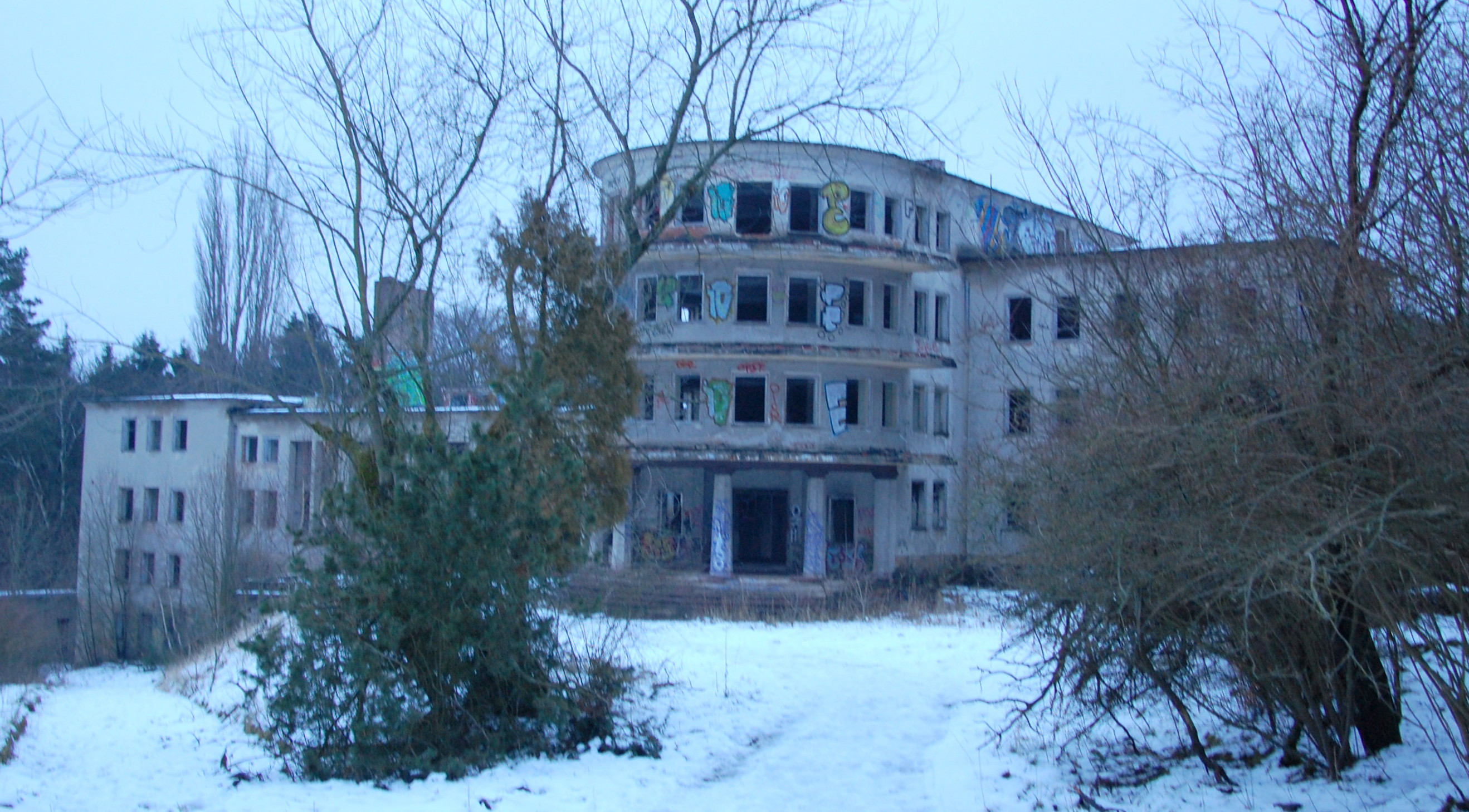 Ruine des FDGB-Ferienheim Fritz Heckert